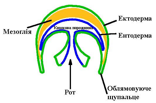 Будова (морфологія) кнідарій